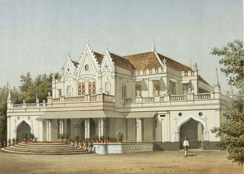 Litho. Litho naar een oorspronkelijke aquarel van J. Rappard.. Het huis van Raden Saleh in Menteng